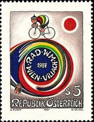 Österreichische Briefmarke zur Rad-Weltmeisterschaft 1987 in Villach